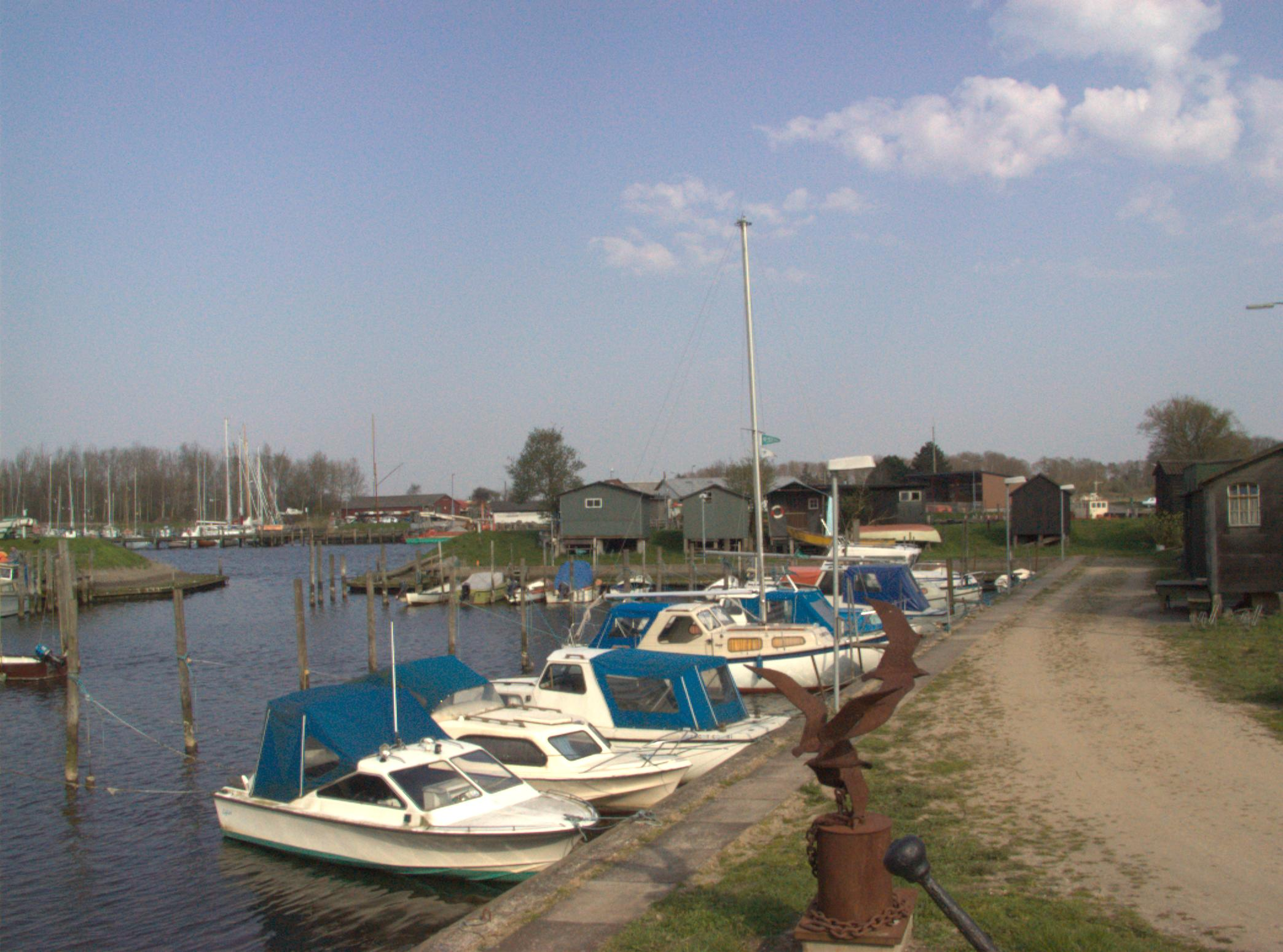 The harbour in Stige, Odense, Denmark.